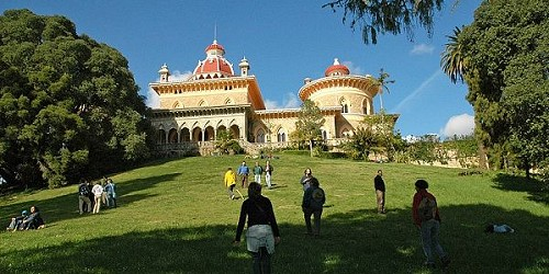 Fotografia autorizada pela Alagamares-Associação Cultural.